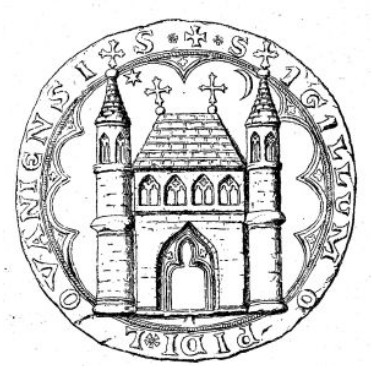 Sceau de Louvain, représentant l'église de Saint-Pierre vers 1320